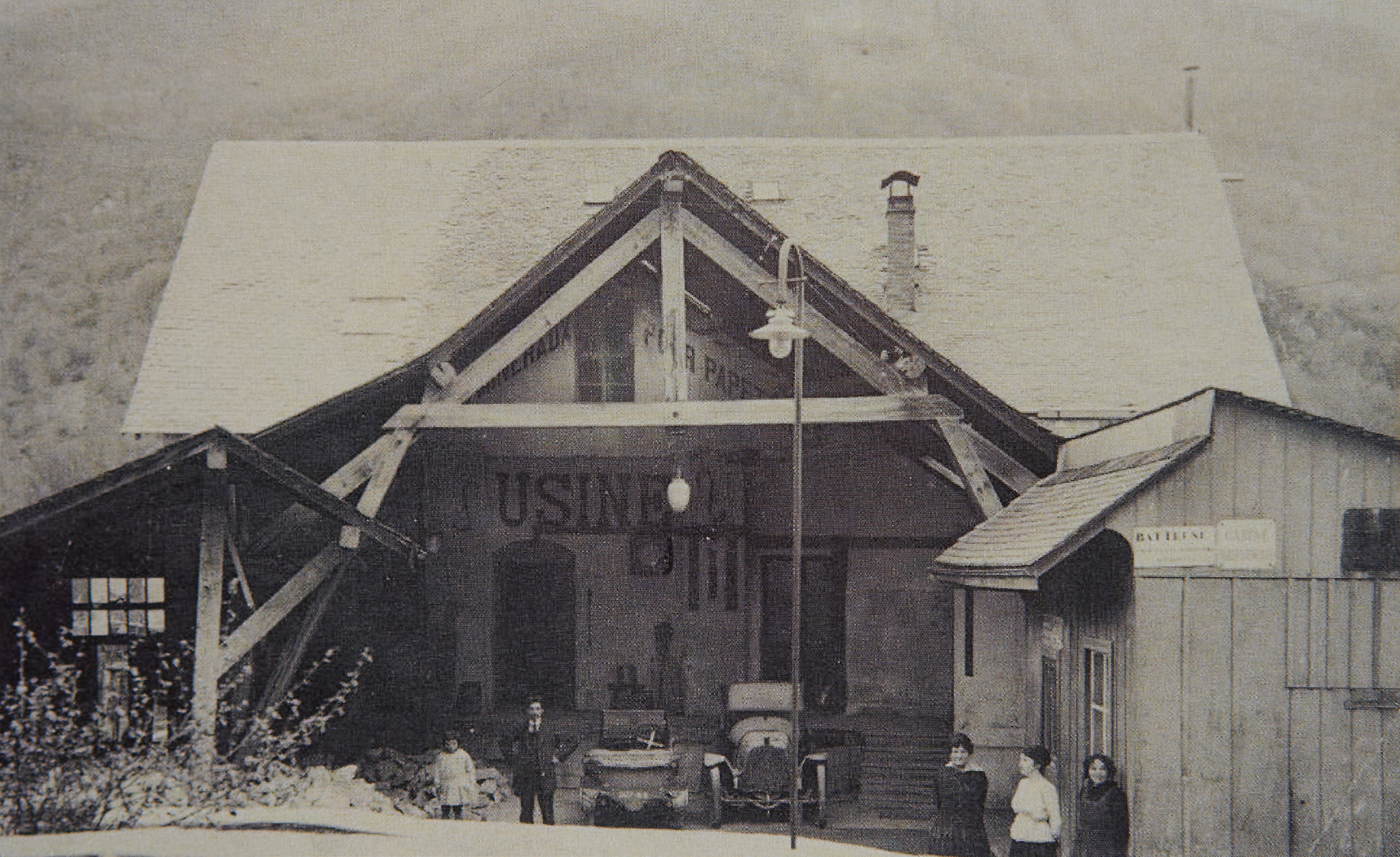 Tivoly le chalet de fondation